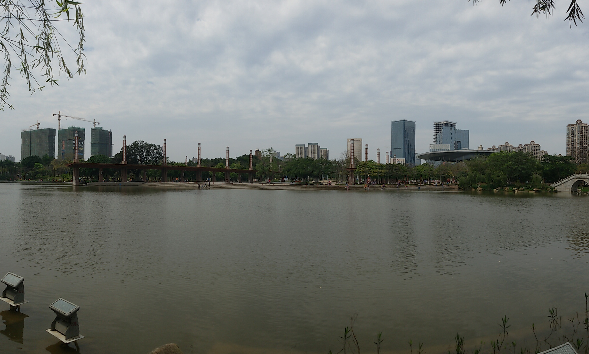 粵語: 南海活水公园